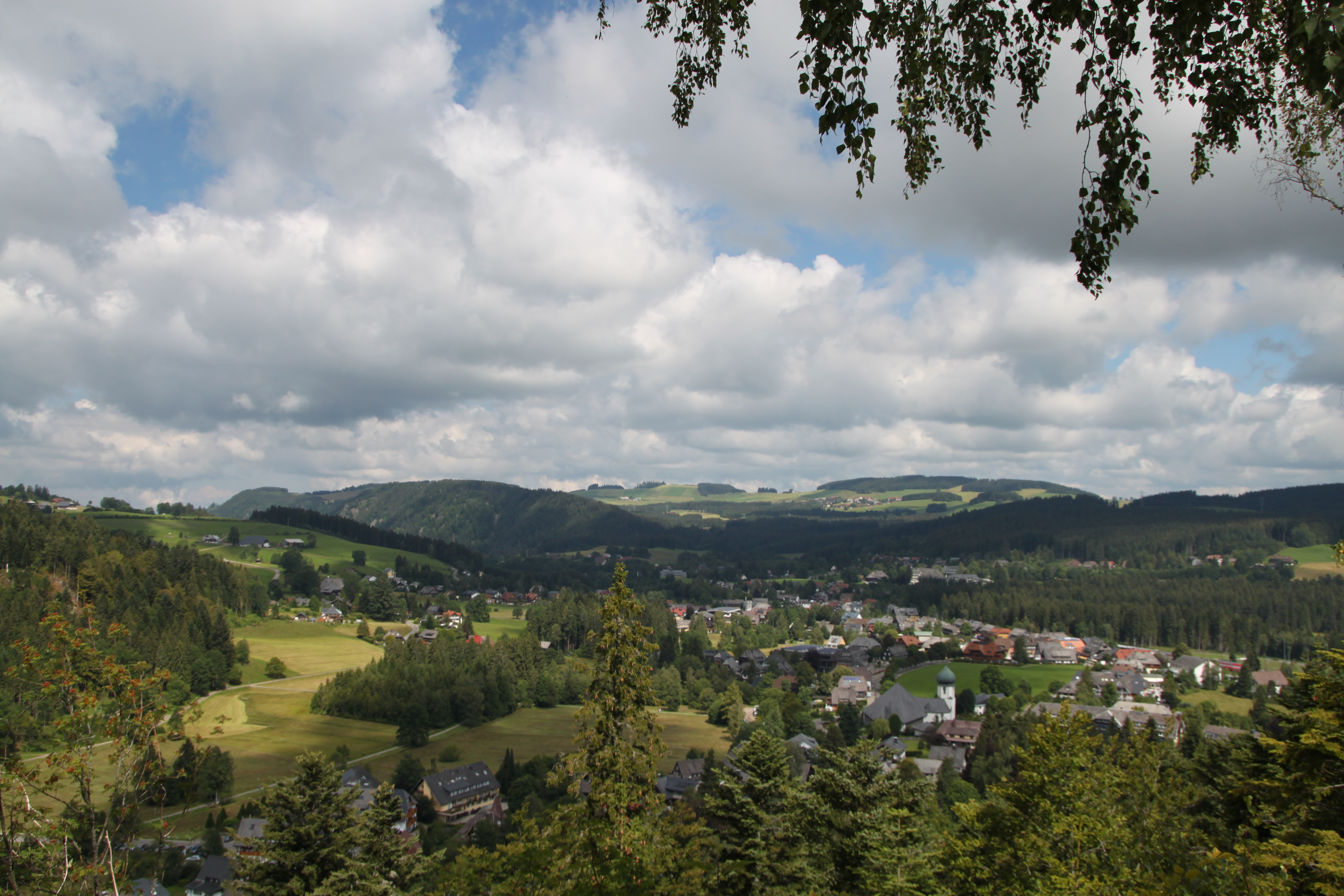 Blick auf Hinterzarten von der Spitze der Adler-Sprungschanze